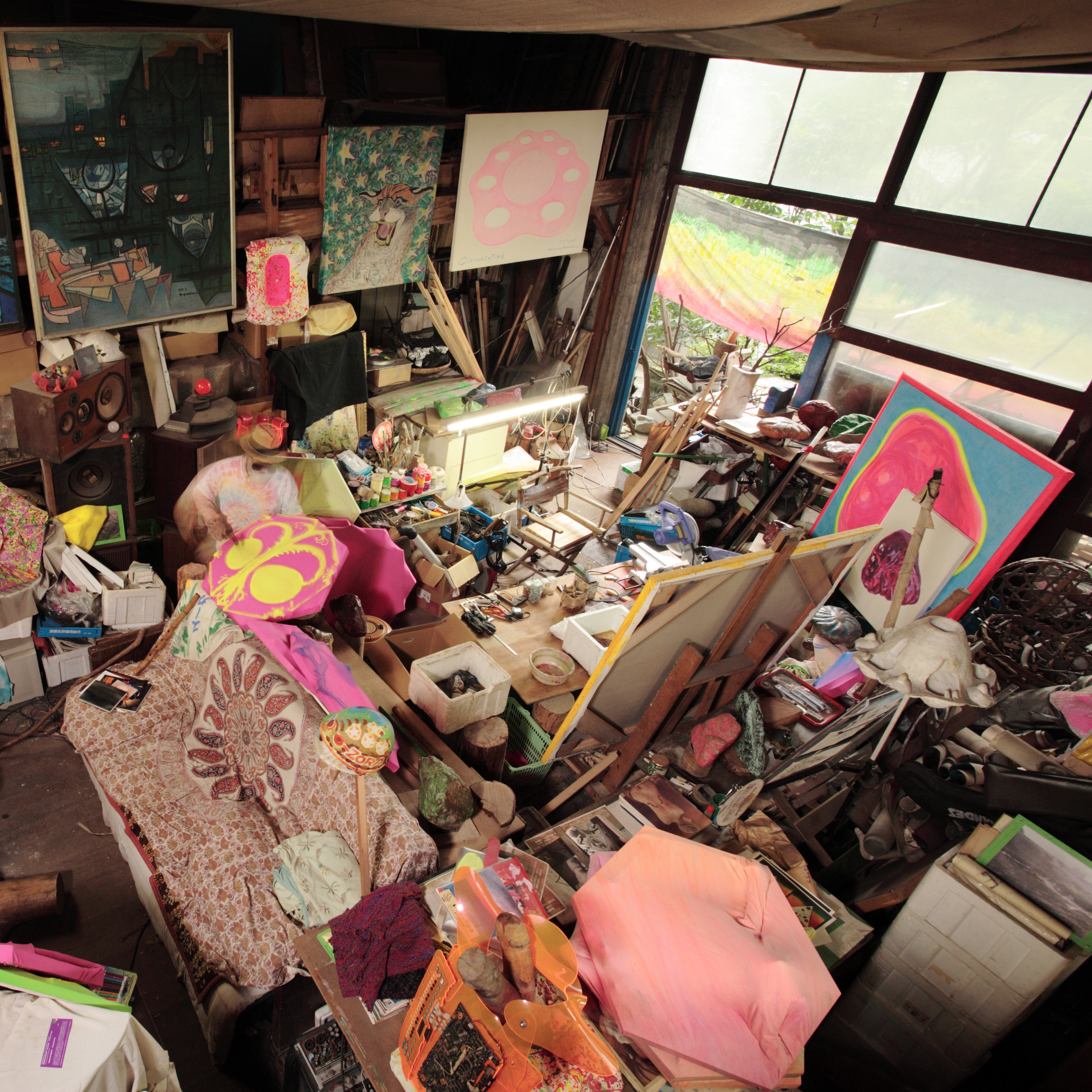 ２００７年ヒカリノカタチ展制作風景